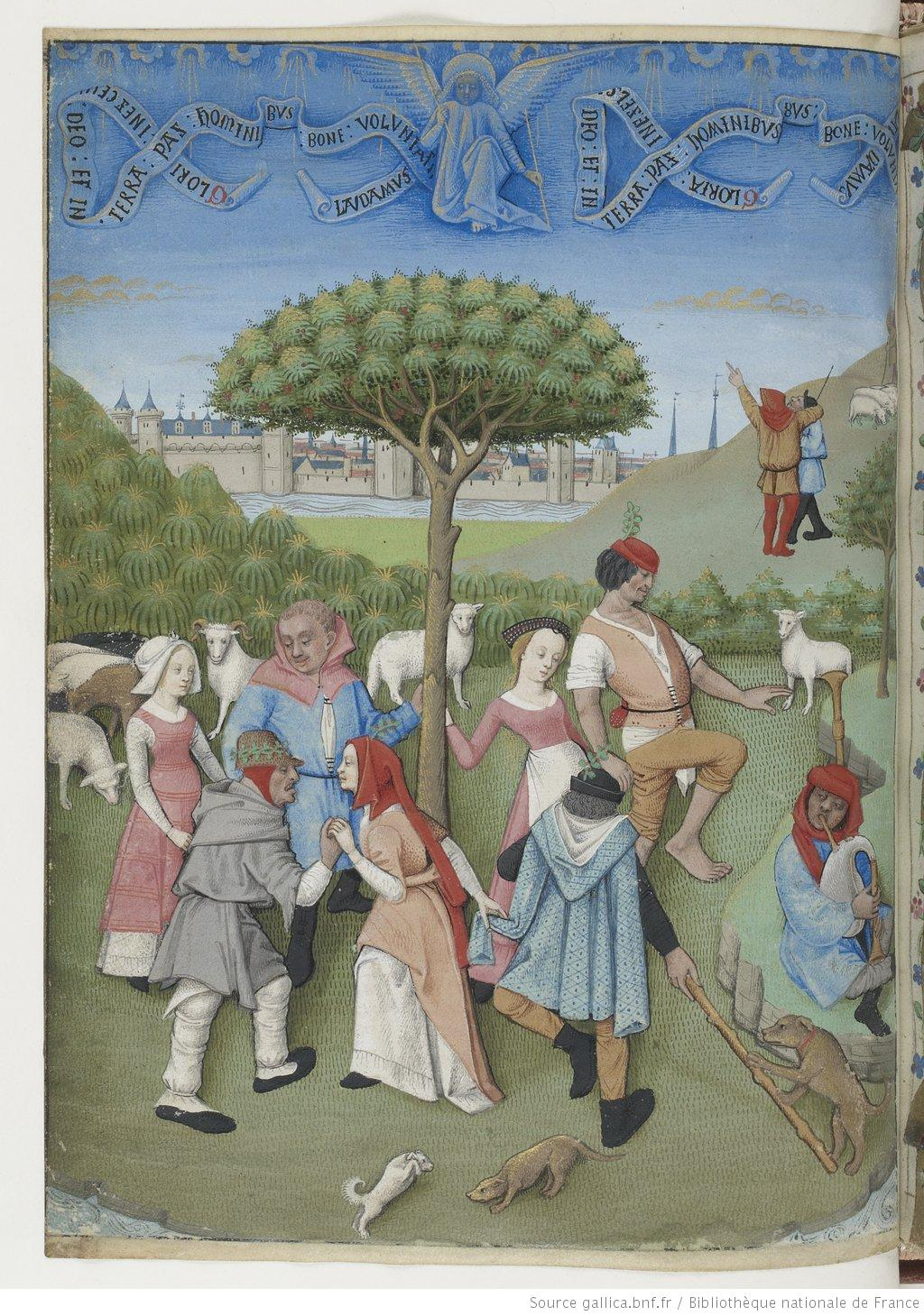 LHCAMoleiro